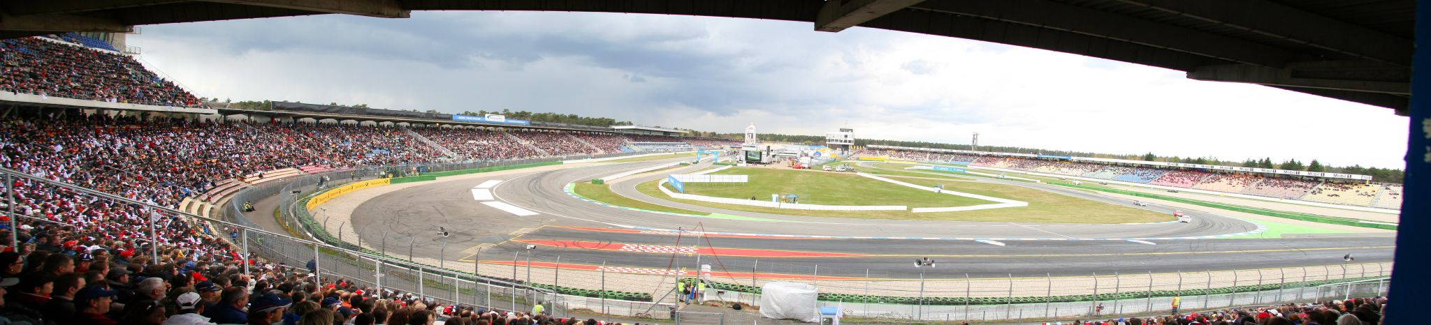 Südkurve Panorama Hockenheim DTM 2008 zum Saisonauftakt am 13. April